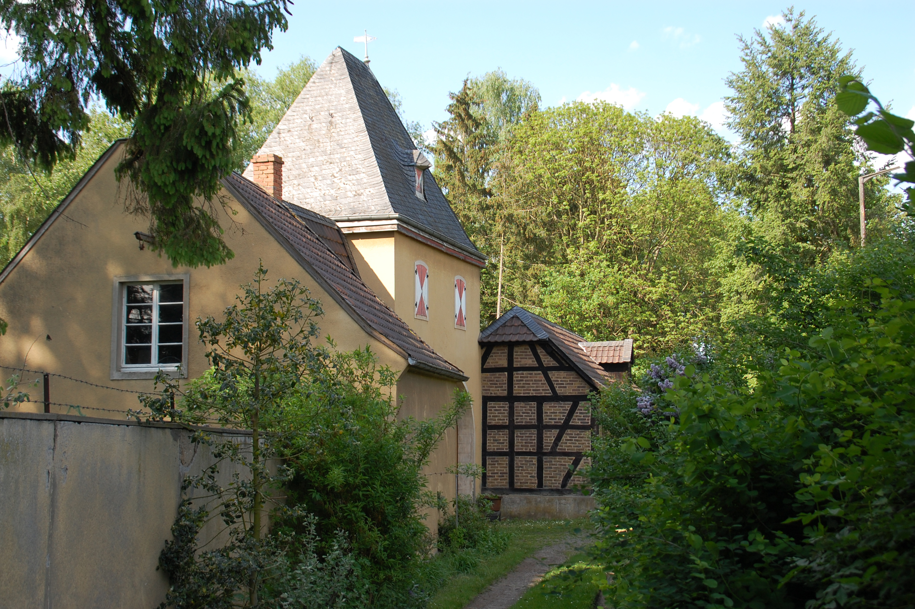 Niederberg, Germany: Torhaus der Burg, Bleistraße 8